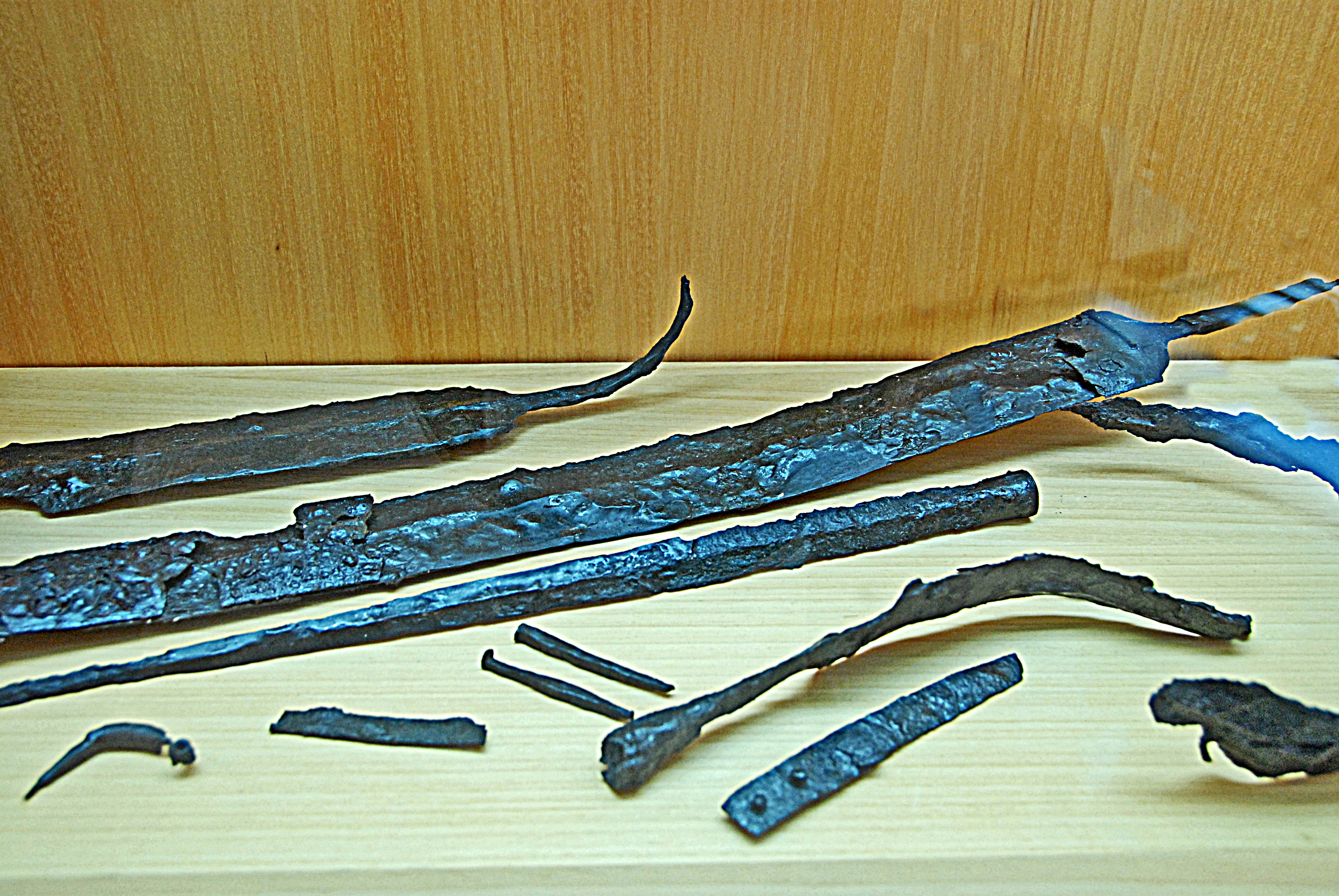 Civaux, Museum, Eisenwaffen, Eisenzeit